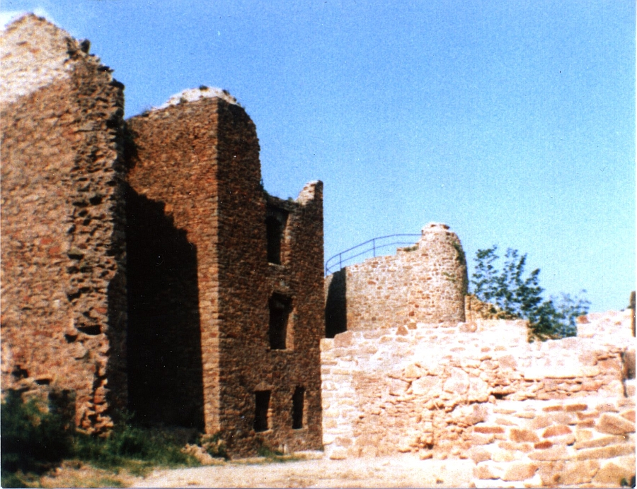 Burg Montfort, Ganerbenhäuser